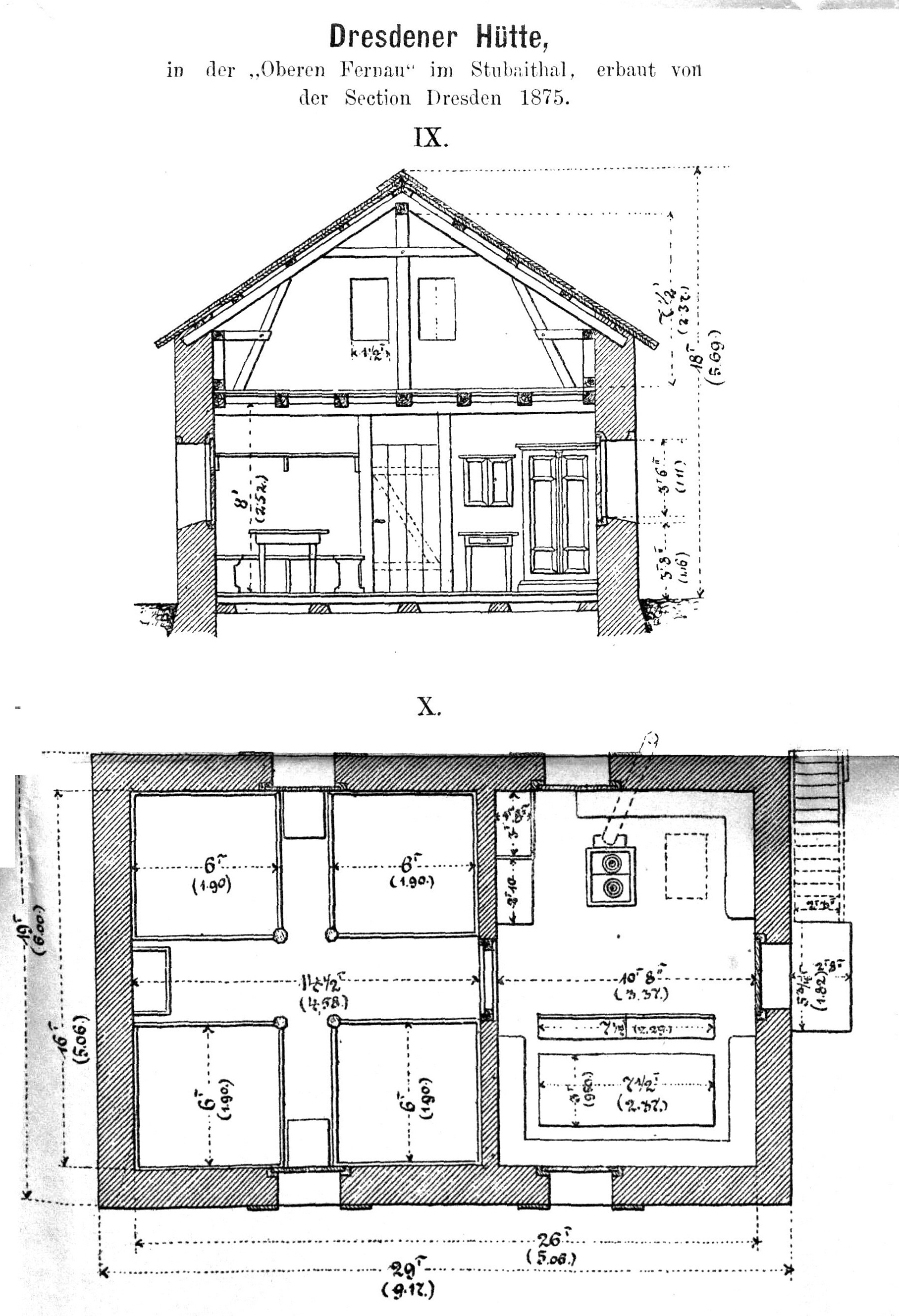 Entwurfszeichnung der Dresdner Hütte aus Zeitschrift des Deutschen und Österreichischen Alpenvereins Bd.08 (1877)